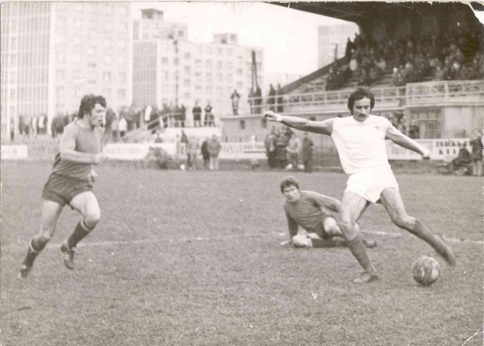 Alexander Nagy , bývalý hráč a tréner klubu, reprezentant býválého Československa. Na jeho počesť sa na Spiši pravidelne počas Spišských trhov koná medzinárodný Memoriál A. Nagya za účasti bývalých hráčov.